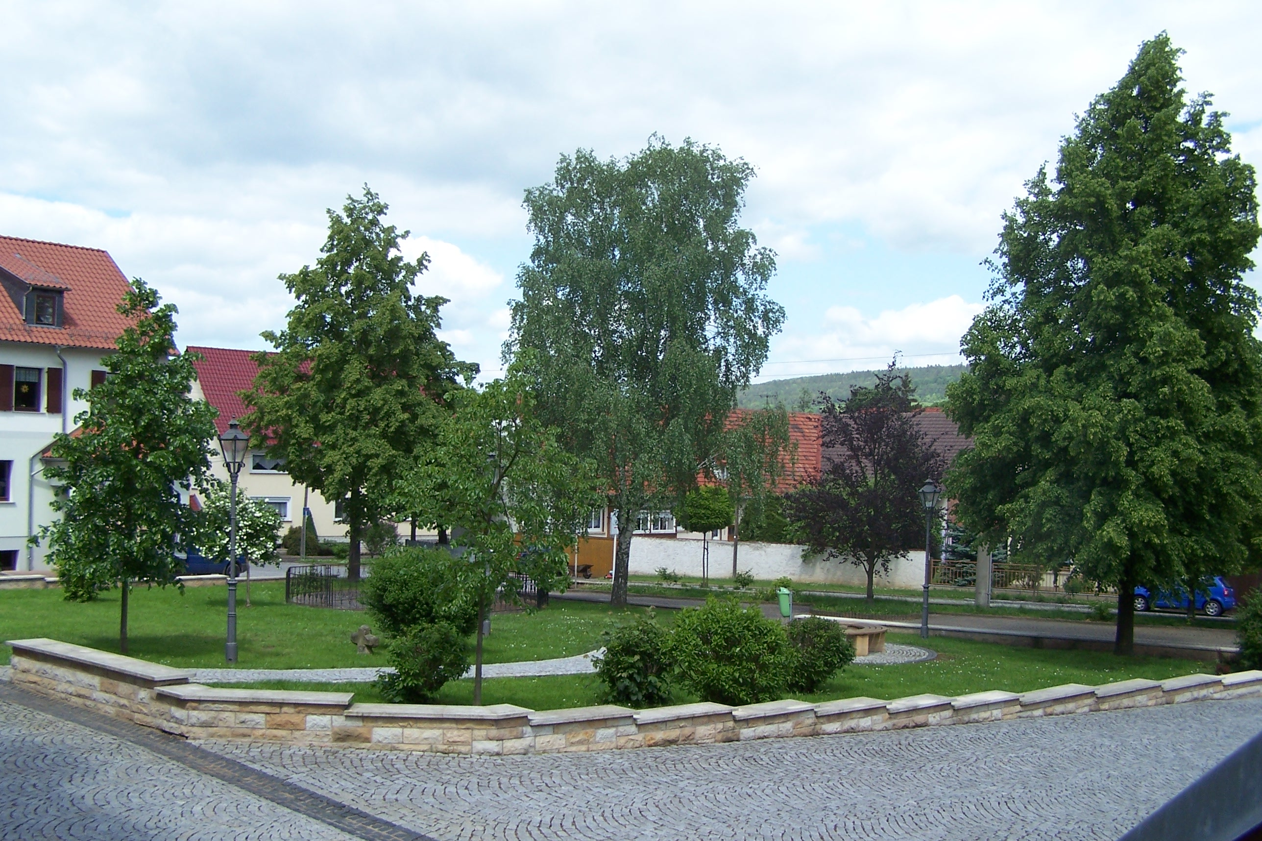 Ansichten und Details zum Schloss Bischofroda im Wartburgkreis.